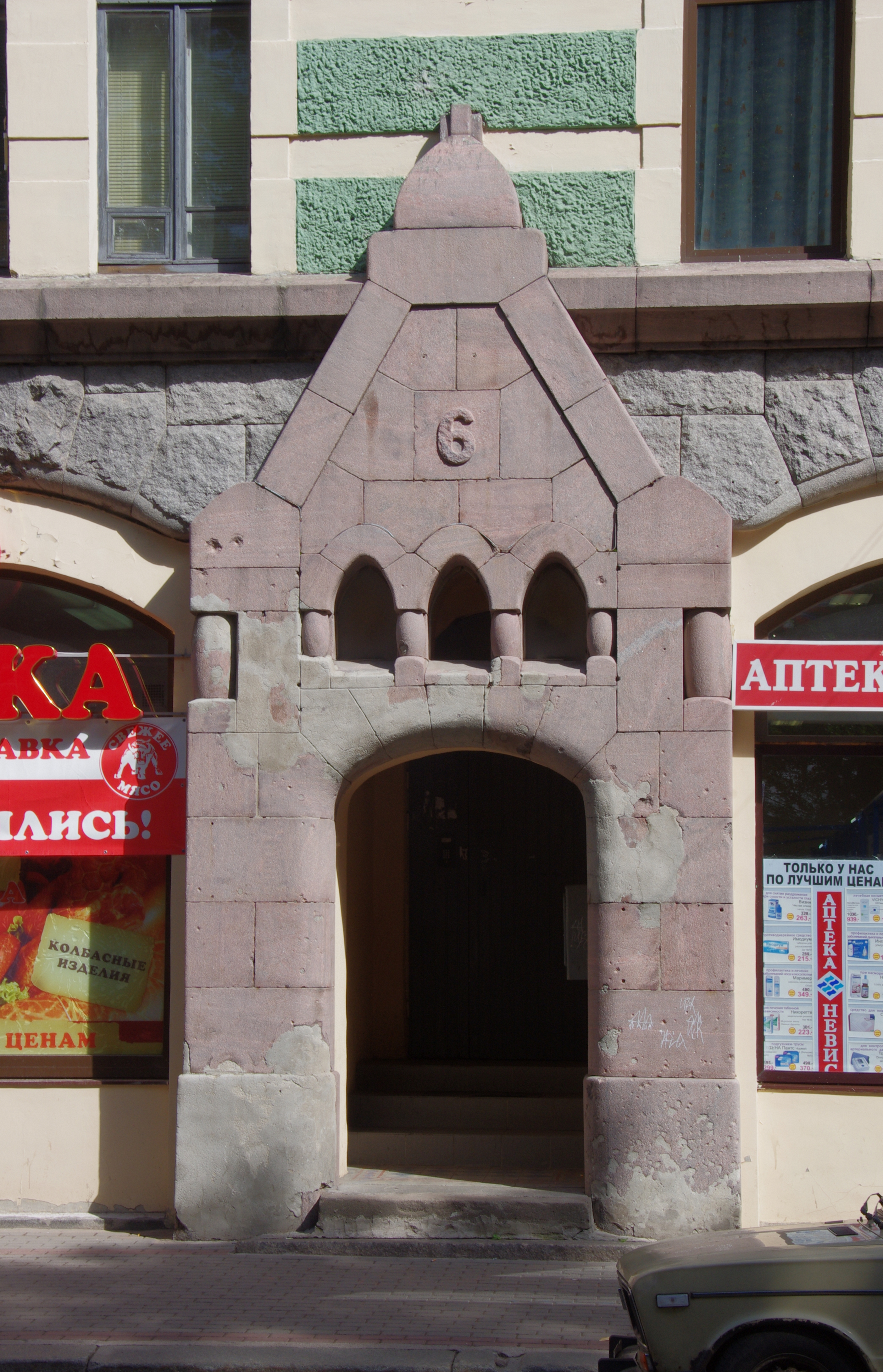 Vyborg, Leningrad Oblast, Russia